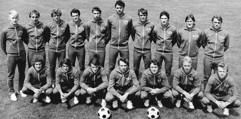 ADN-ZB-Raphael-30.7.80-Moskau: Olympia. Durch den 1:0-Halbfinal-Sieg gegen die UdSSR erreichte die DDR-Fußballauswahl das Endspiel gegen die CSSR am 2.8. und hat damit die Chance, ihren Olympiasieg von 1976 zu wiederholen. Obere Reihe vl.n.r.: Matthias Liebers, Frank Baum, Frank Uhlig, Lothar Kause, Jürgen Bähringer, Torhüter Bodo Rudwaleit, Torhüter Bernd Jakubowski, Andreas Trautmann, Norbert Trieloff und Rüdiger Schnuphase. Untere Reihe v.l.n.r.: Wolfgang Steinbach, Werner Peter, Artur Ullrich, Mannschaftskapitän Frank Terletzki, Matthias Müller, Dieter Kühn und Wolf-Rüdiger Netz.